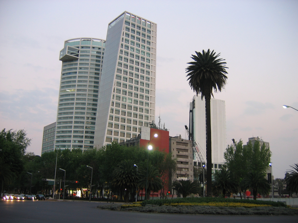 Complejo Reforma 222